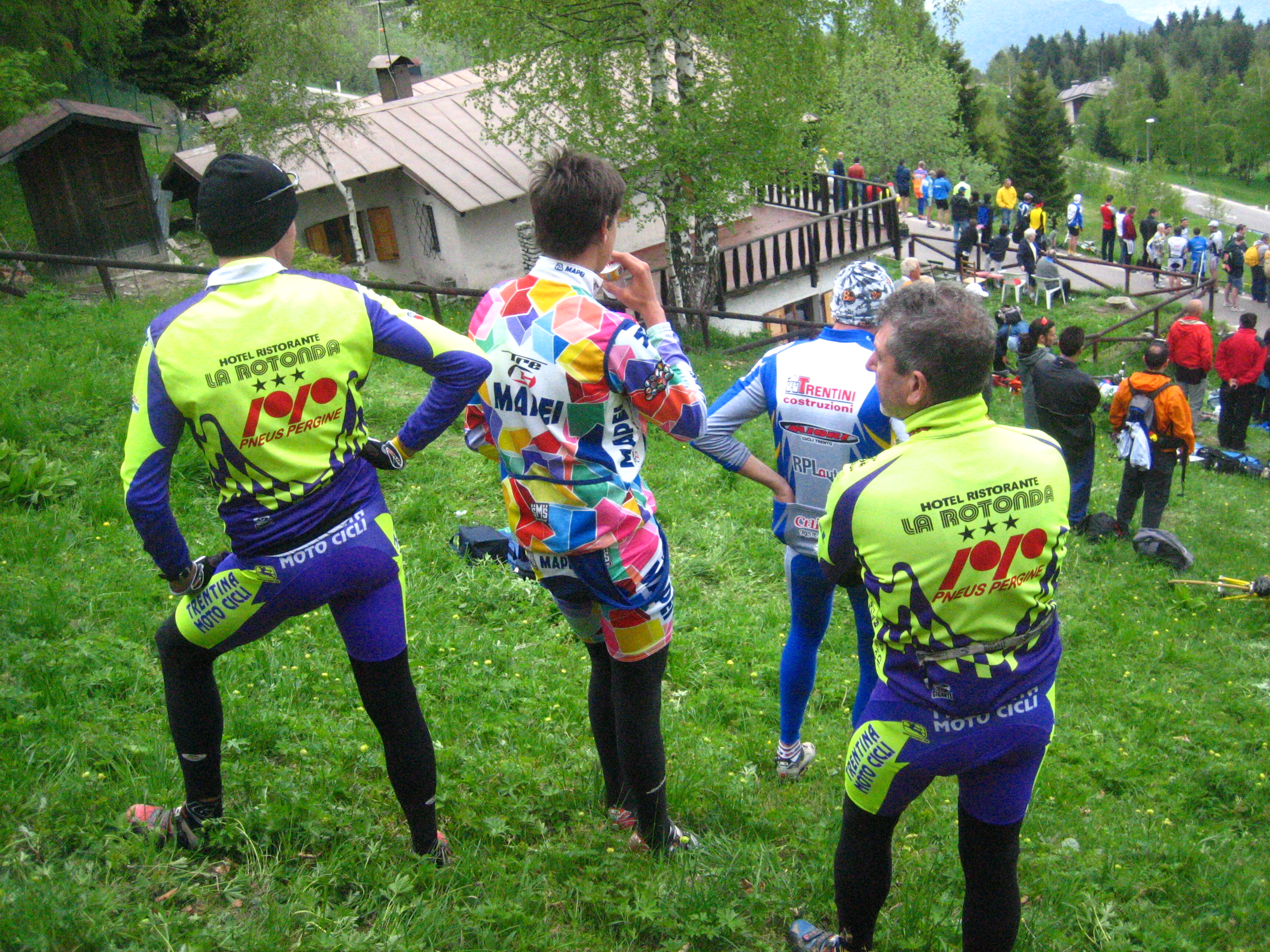 Giro d'Italia 2006, 16a tappa, Monte Bondone.